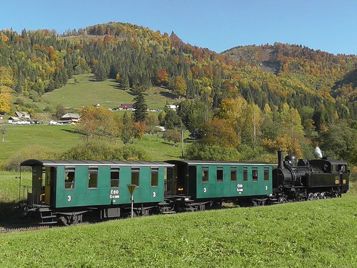 MÁV TIVc 4296 bei einer Fahrt für die DGEG kurz vor Zbojská.